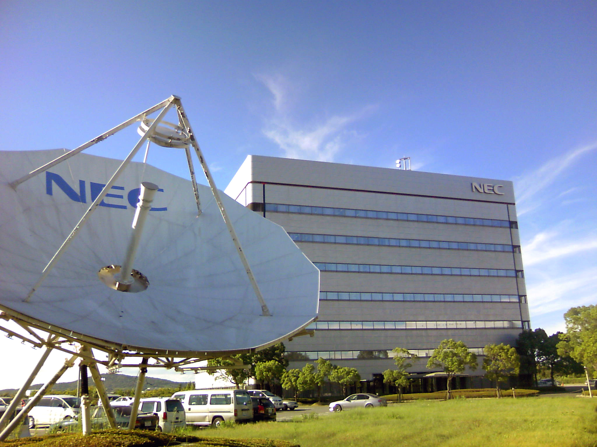 NEC神戸システムセンター